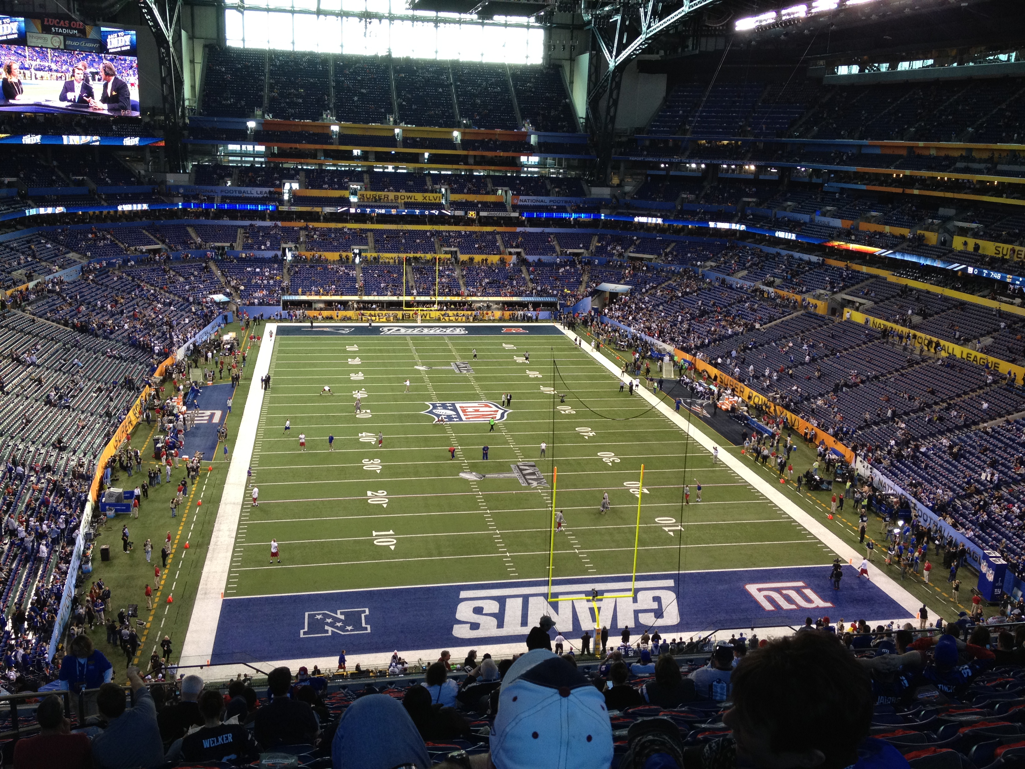 pre-game inside Lucas Oil Stadium